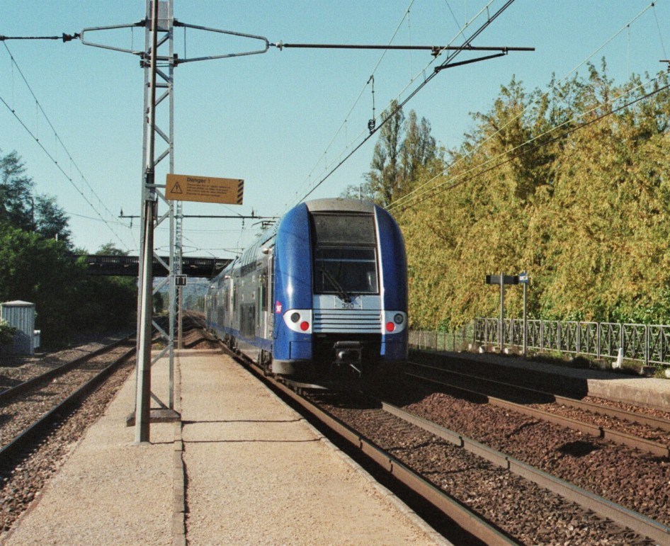 Une rame TER Lyon-Villefranche quitte la gare de Quincieux